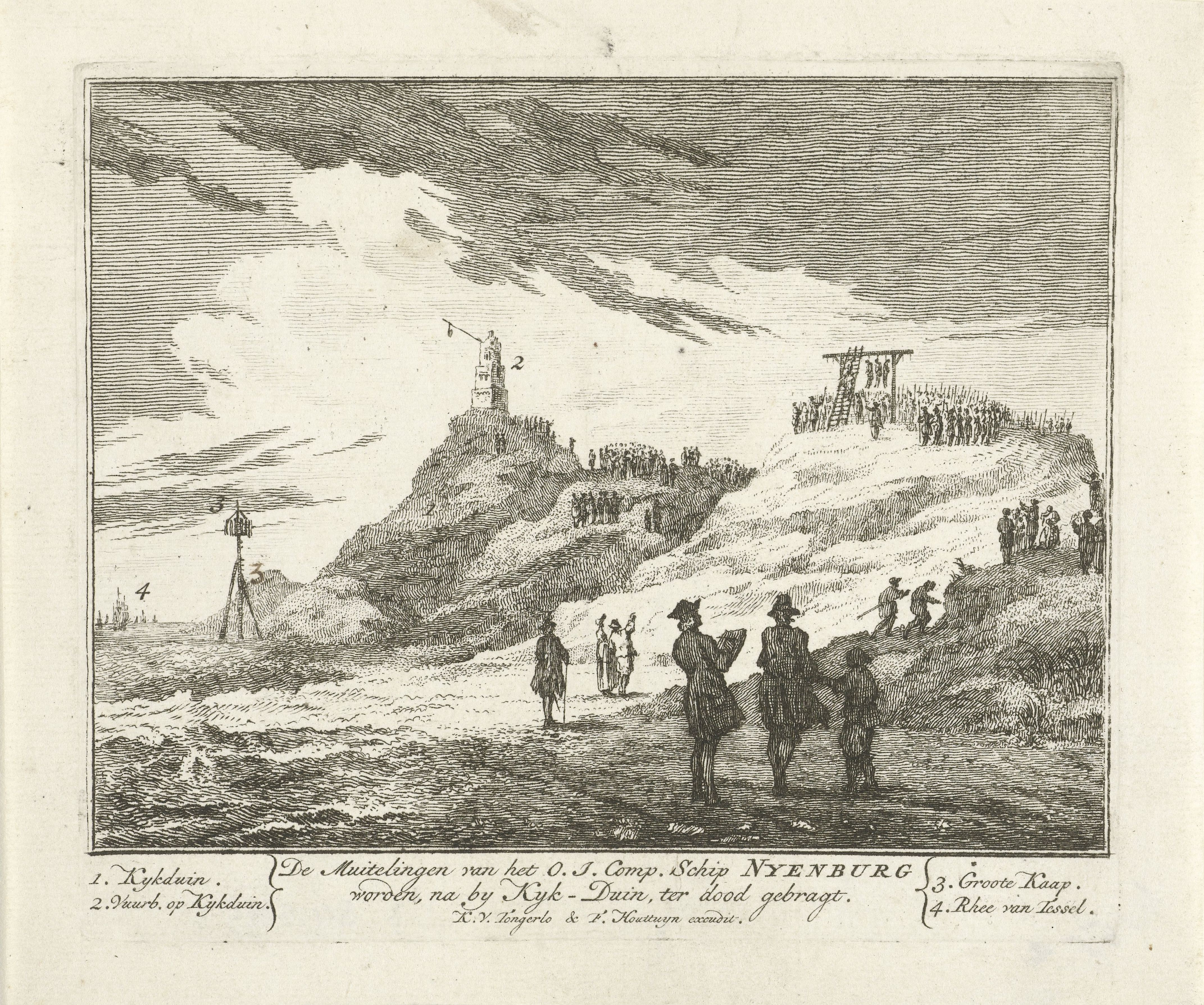 IdentificatieTitel(s): Executie van de muiters van de Nijenburg bij Huisduinen, 1764De Muitelingen van het O.I. Comp. Schip Nyenburg worden, na by Kyk-Duin ter dood gebragt (titel op object)Objecttype: prent Objectnummer: RP-P-OB-84.593Catalogusreferentie: FMH 4155-aOpmerking: staat met de letterOpschriften / Merken: verzamelaarsmerk, verso, gestempeld: Lugt 2228Omschrijving: De veroordeelde muiters van het koopvaardijschip genaamd de Nijenburg worden in de duinen bij Huisduinen ter dood gebracht. In de verte een menigte rond de galgen bovenop een duin, links de hoge duin genaamd Kijkduin Waar: op een vuurbaken en in de verte de rede van Texel. Op de voorgrond enkele personen waaronder een tekenaar. In het onderschrift de verklaring van de cijfers 1-4.VervaardigingVervaardiger: prentmaker: anoniemuitgever: Kornelis van Tongerlo (vermeld op object)uitgever: Frans Houttuyn (vermeld op object)Plaats vervaardiging: Noordelijke NederlandenDatering: 1764Fysieke kenmerken: etsMateriaal: papier Techniek: etsenAfmetingen: plaatrand: h 120 mm × b 143 mmOnderwerpWat: violent death by hangingWanneer: 1764-09 - 1764-09WaarHuisduinenVerwerving en rechtenVerwerving: aankoop 1881Copyright: Publiek domein